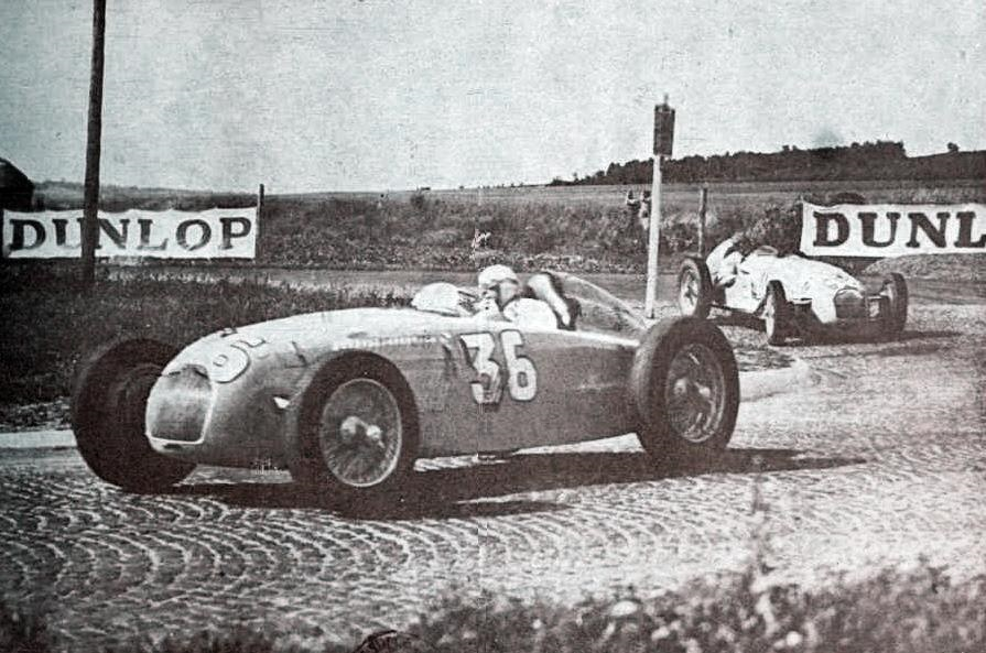 René Le Bègue sur Talbot, troisième du Grand Prix de l'ACF 1939.